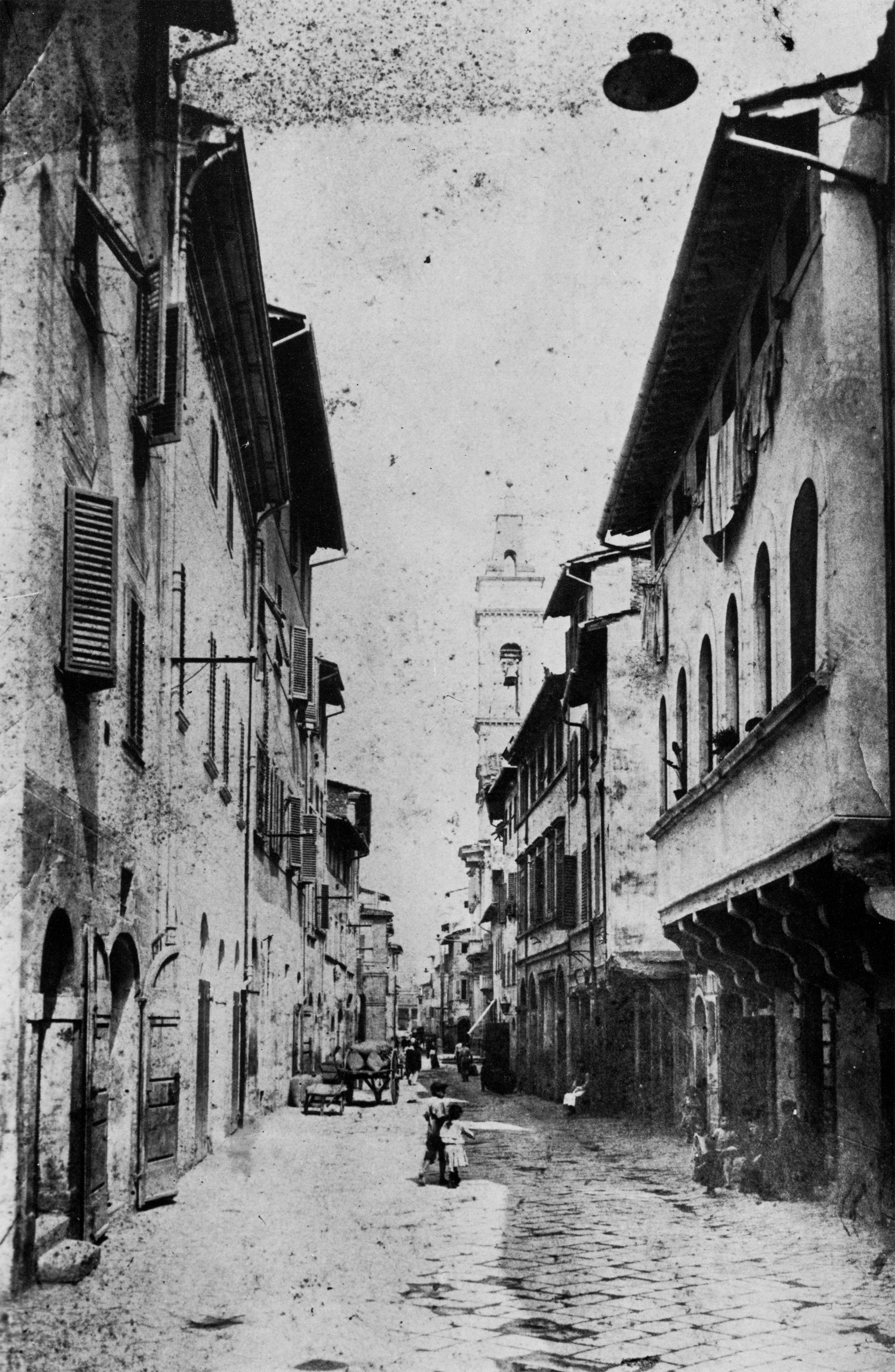 Via Cennano in Montevarchi